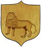 Беларуская (тарашкевіца): Гарадок (Haradok). Герб места